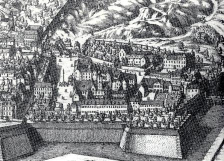 Paulustorvorstadt in Graz - mit Paulustor, Palmburg und Karmeliterplatz und -kloster, um 1699